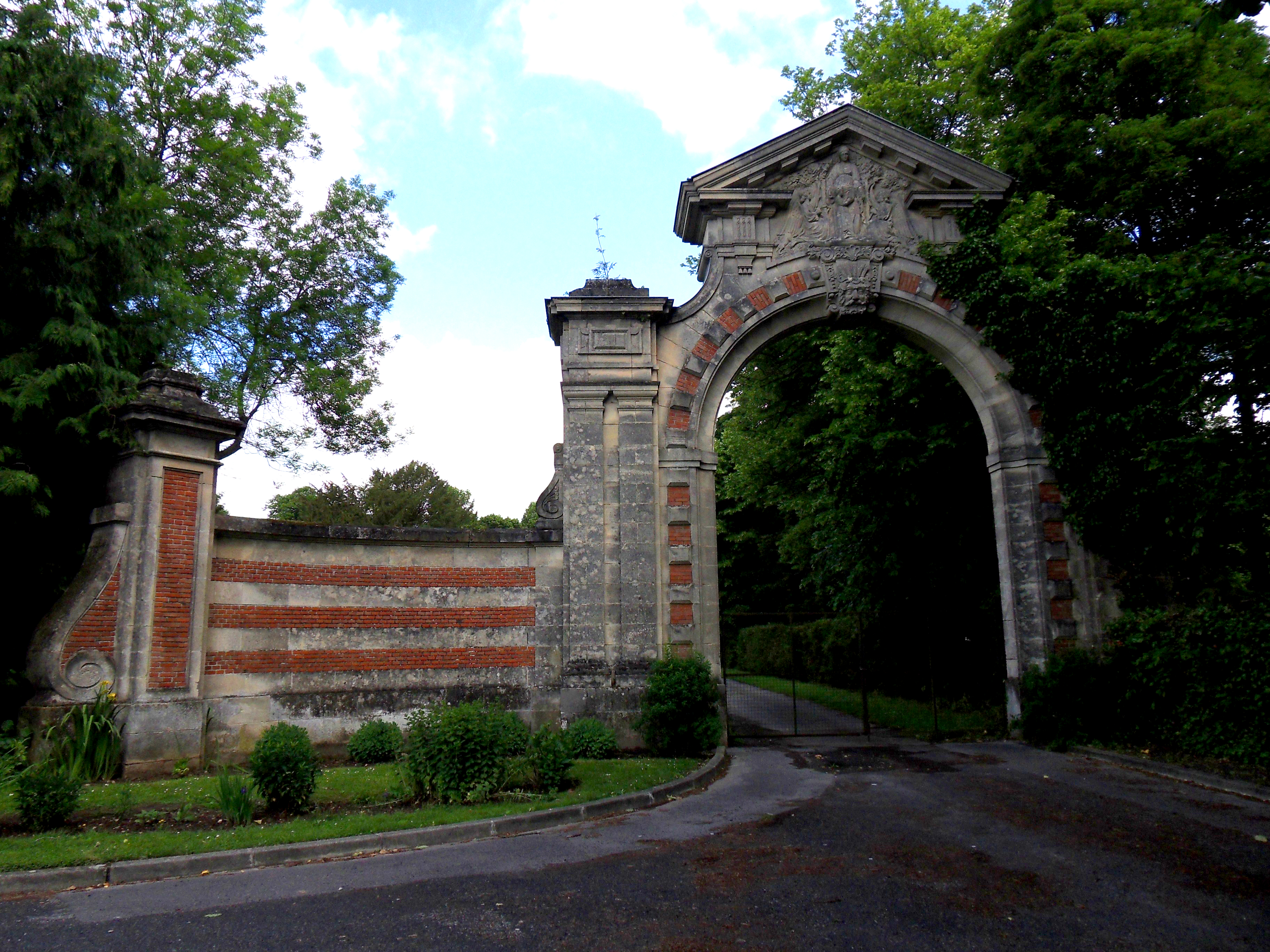 Ribeaucourt (Somme, France). L'entrée du château.